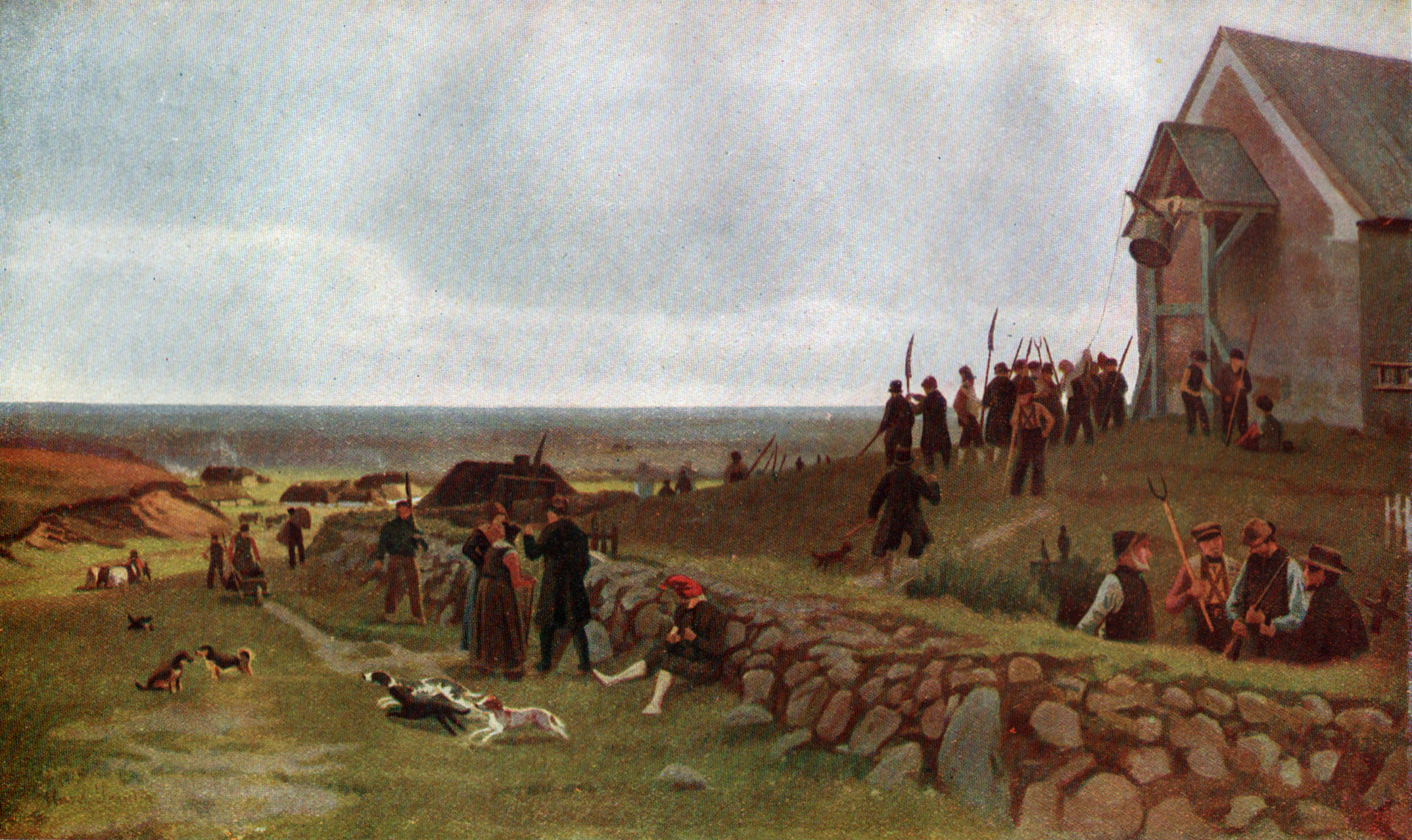 Stormklokkerne motiv fra Slavekrigen; Maleri af Hans Smidth